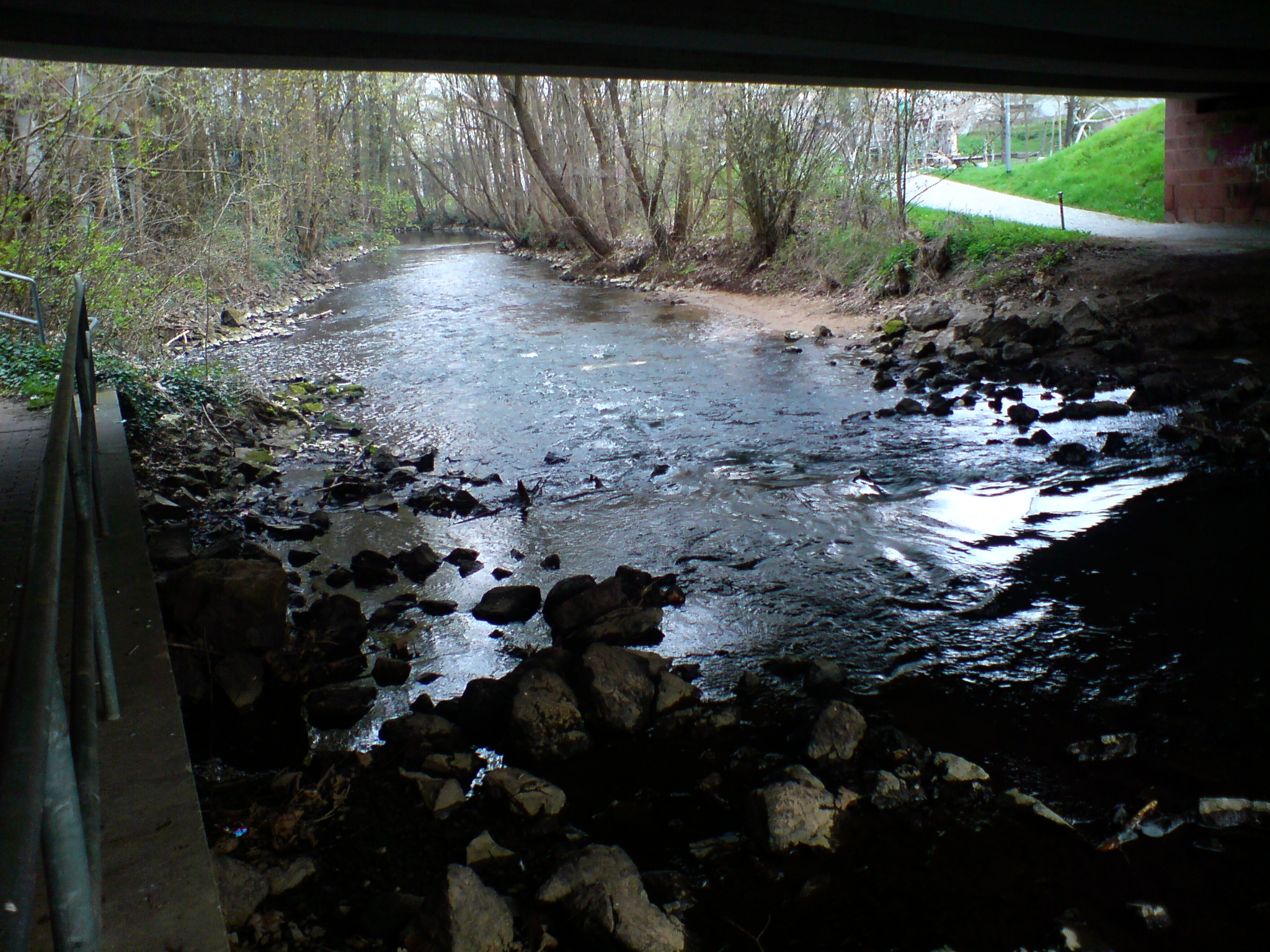 Roth in Roth (kurz vor der Mündung in die Rednitz)